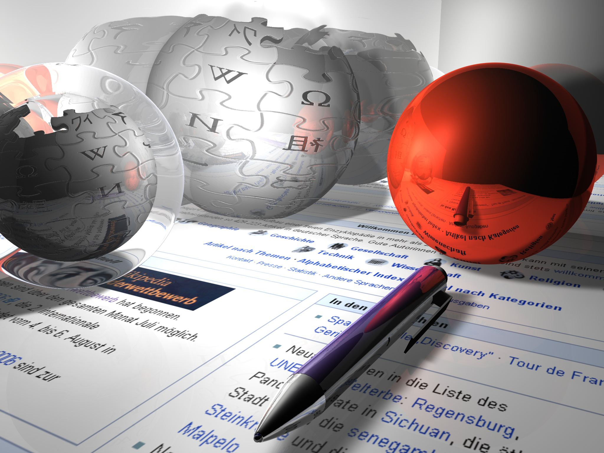 Wikipedia meets 3d in Cinema 4d